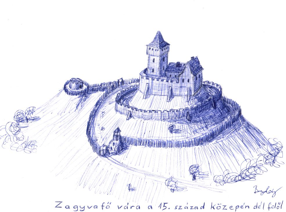 Zagyvafő várának rekonstrukciós rajza feltételezhető 15. század közepén meglévő állapota szerint